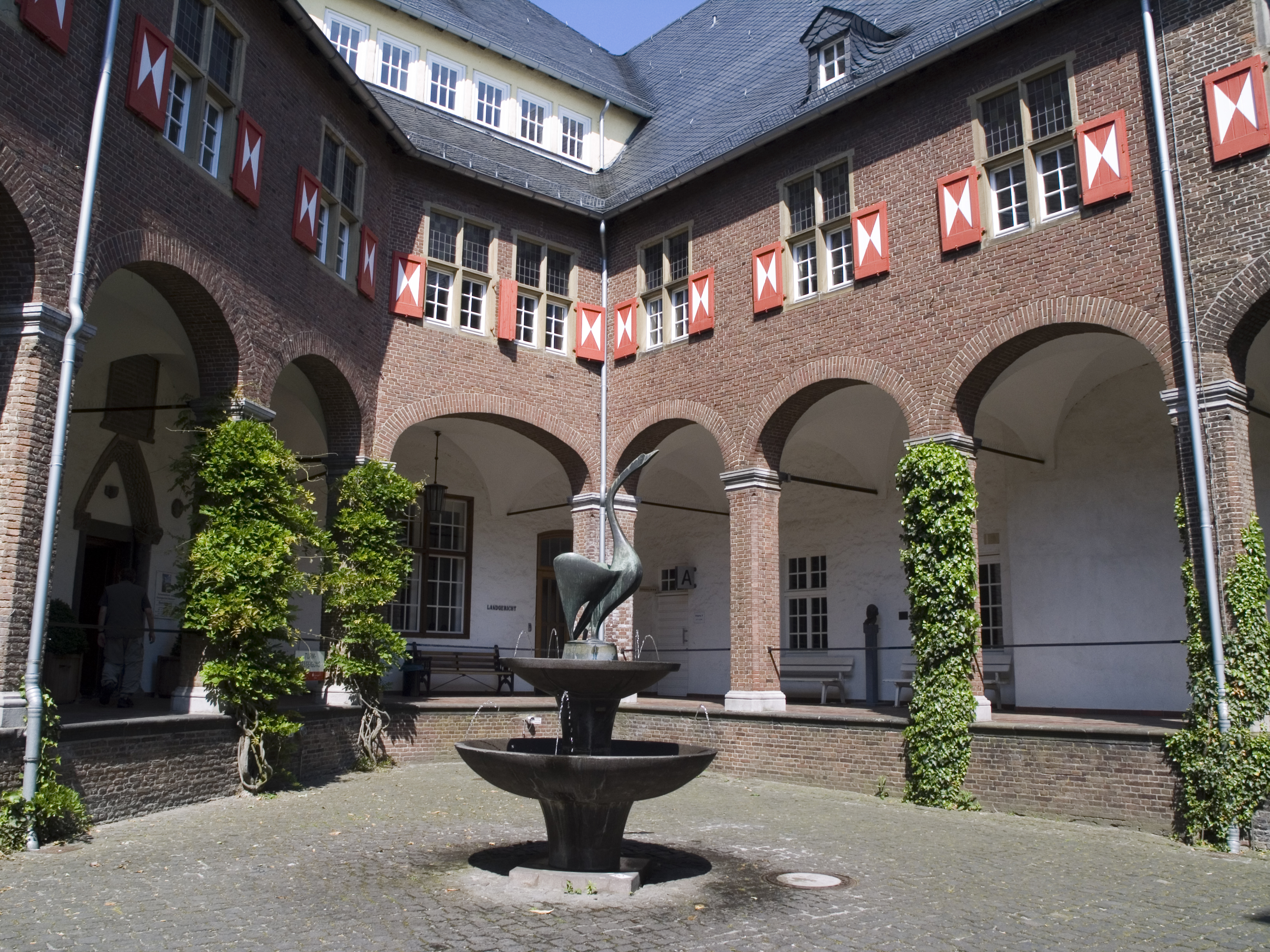 Северный Рейн-Вестфалия, Клеве – замок Шваненбург